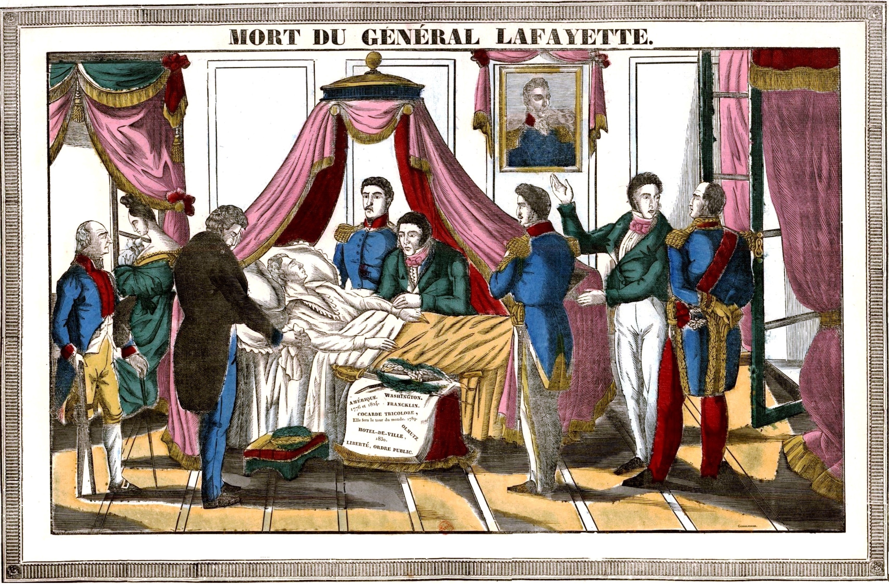 Mort du général Lafayette - Gondelfinger - 1834 - Gravure sur bois coloriée